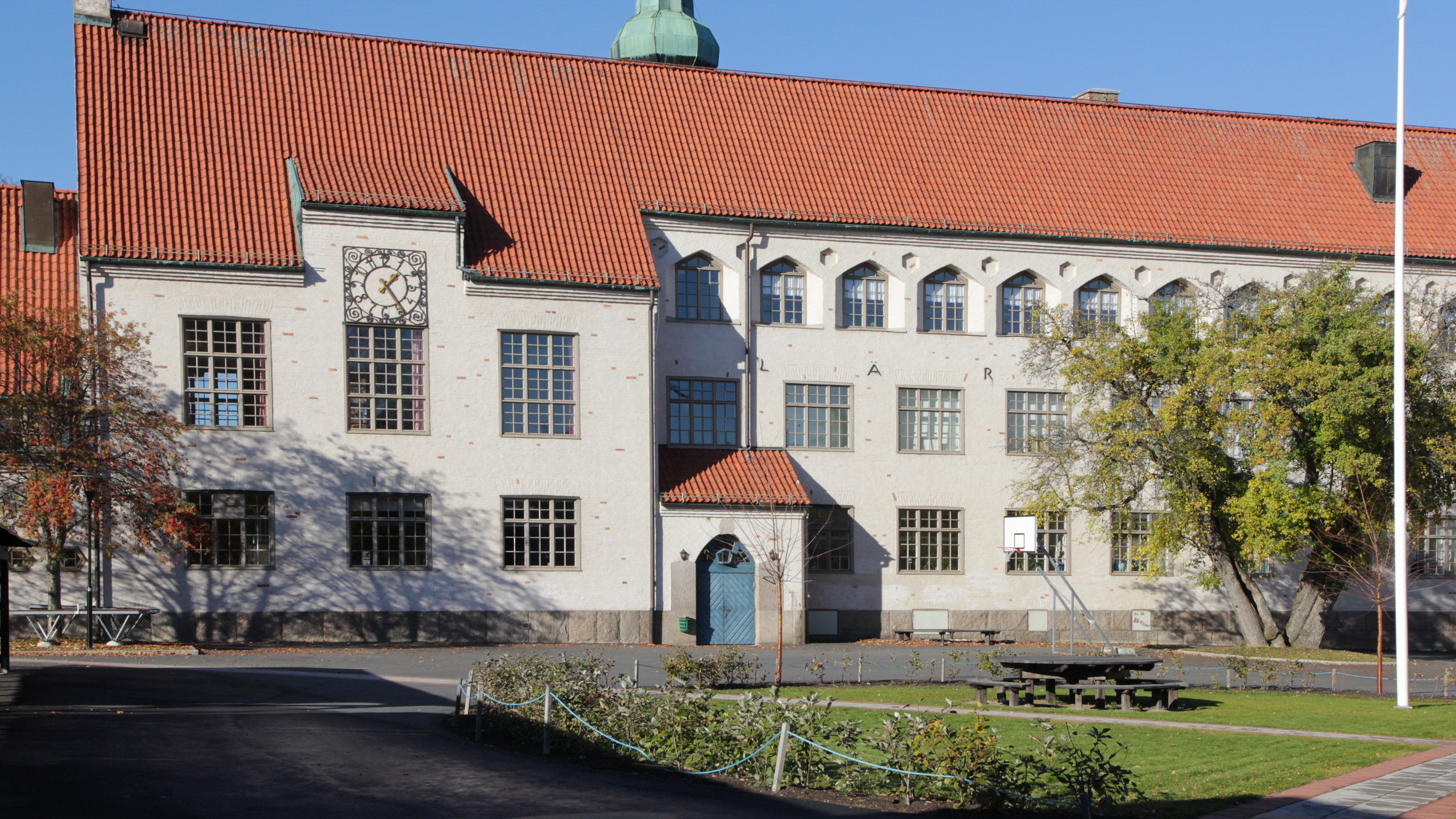 Vasaskolan, Hedemora, Sverige